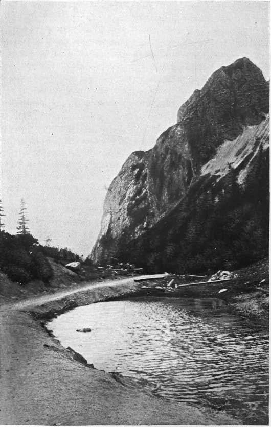 Prelaz Vršič z Jezercem. Ob gradnji ceste so ga zasuli.